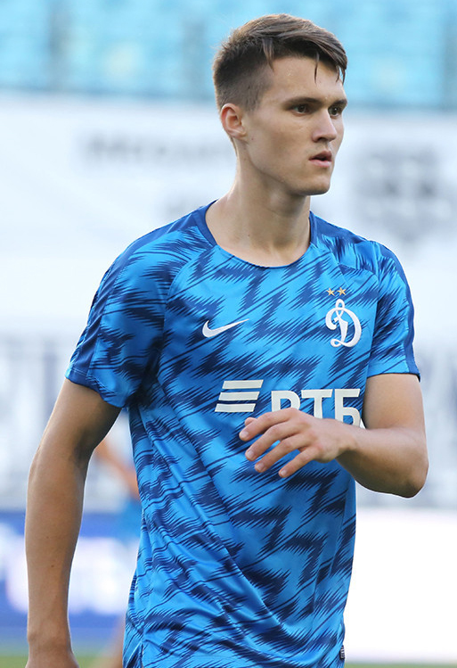 «Динамо» и «Рубин» обменялись голами